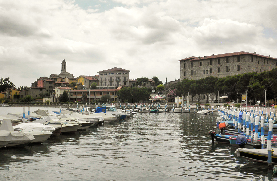 Panorama di Clusane